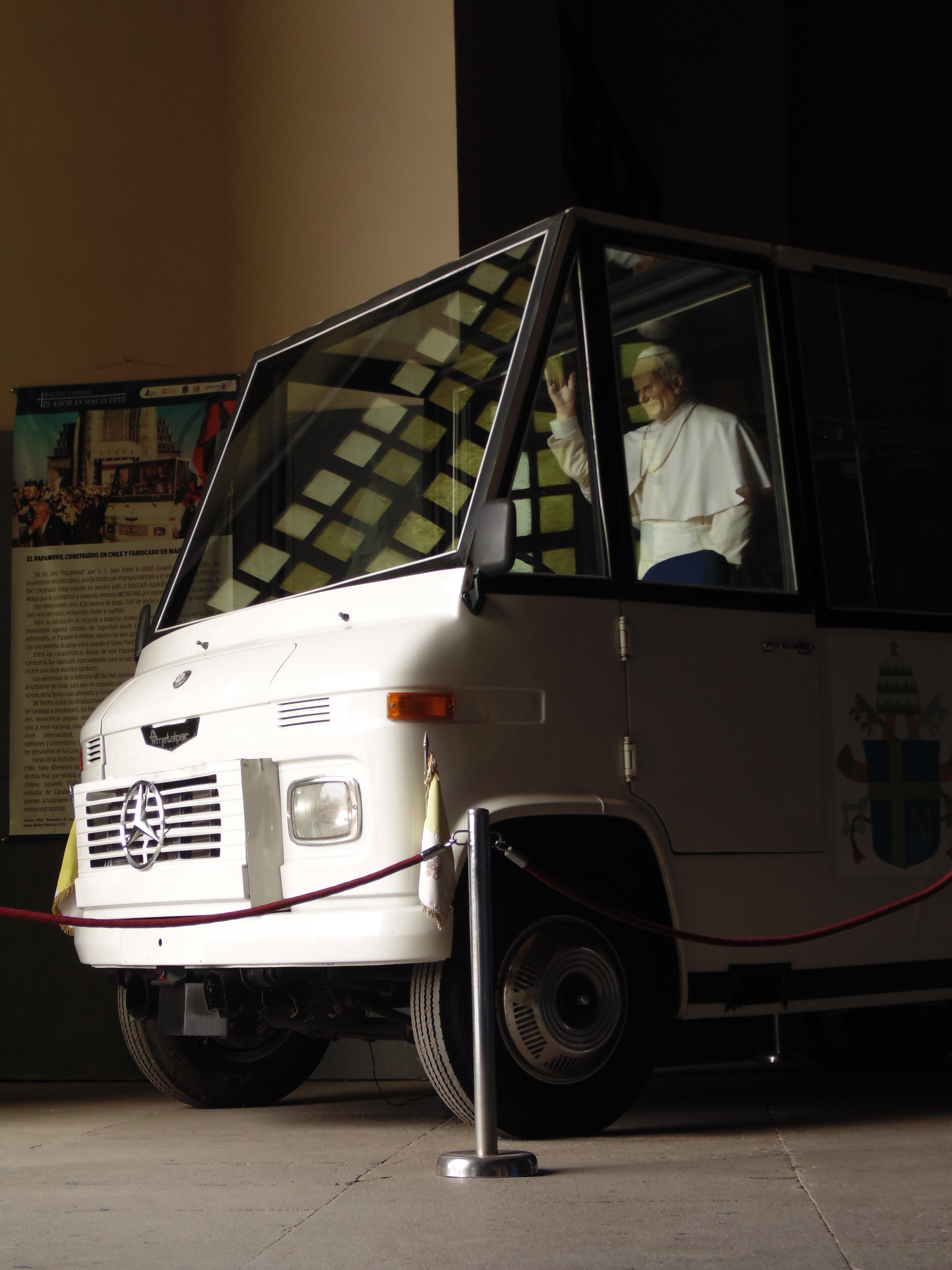 El papamóvil usado por el papa Juan Pablo II durante su visita a Chile en 1987. Este vehículo se hizo exclusivamente para su visita oficial y fue construido con chasis Mercedes-Benz, carrocería Metalpar y equipamiento Bertonati. Fotografía tomada durante una exposición del papamóvil en el Templo Votivo de Maipú. 4 de abril de 2017.